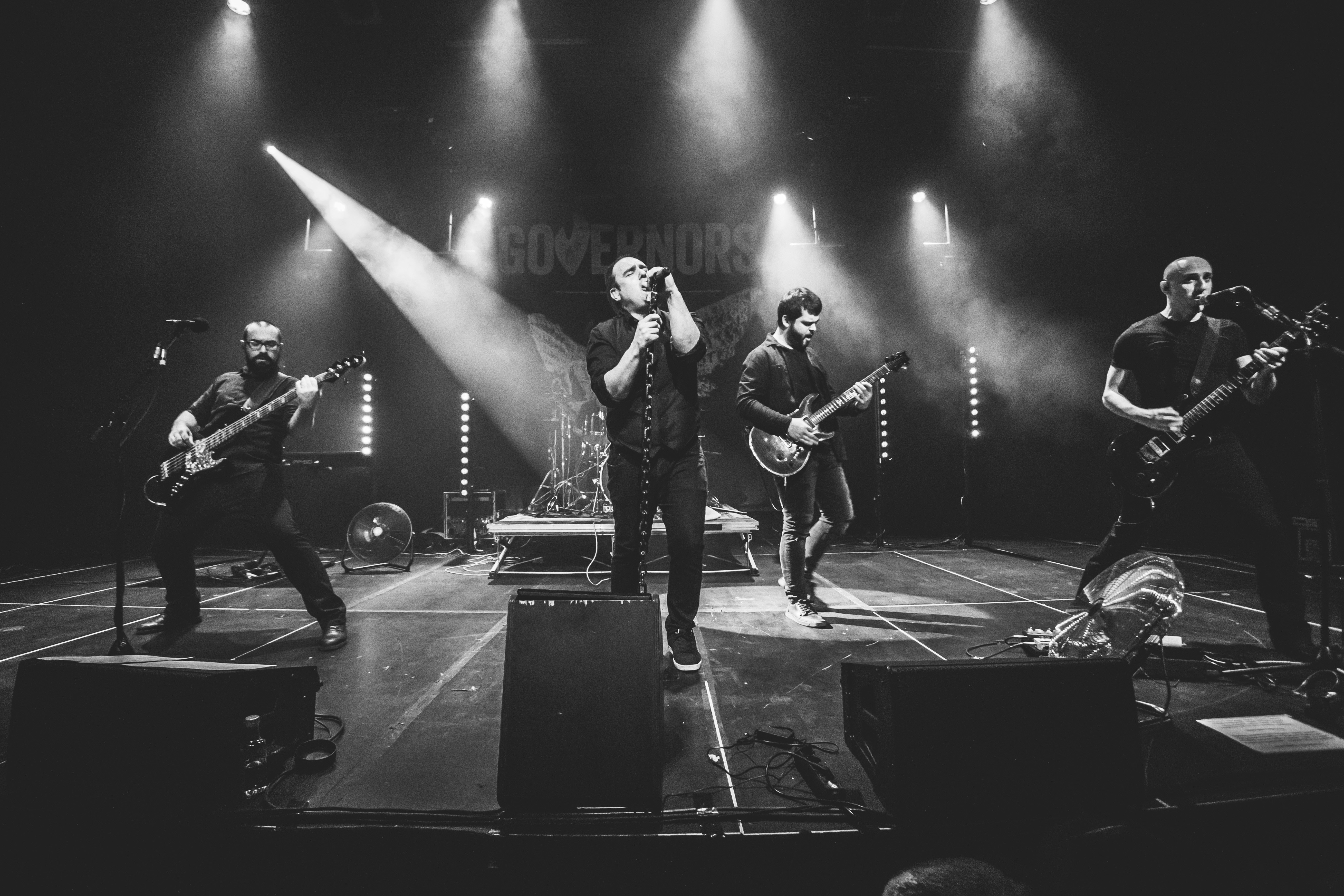 Governors Dkluba. Intxaurrondo K.E. Argazkiak: Donostia Kultura 2018/01/27